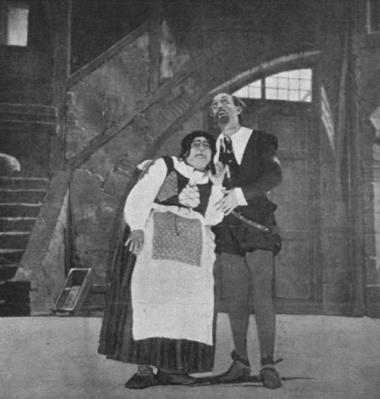 Los actores Ricardo Puga y Leocadia Alba en una escena de la obra de teatro Figuras del Quijote, de Carlos Fernández Shaw